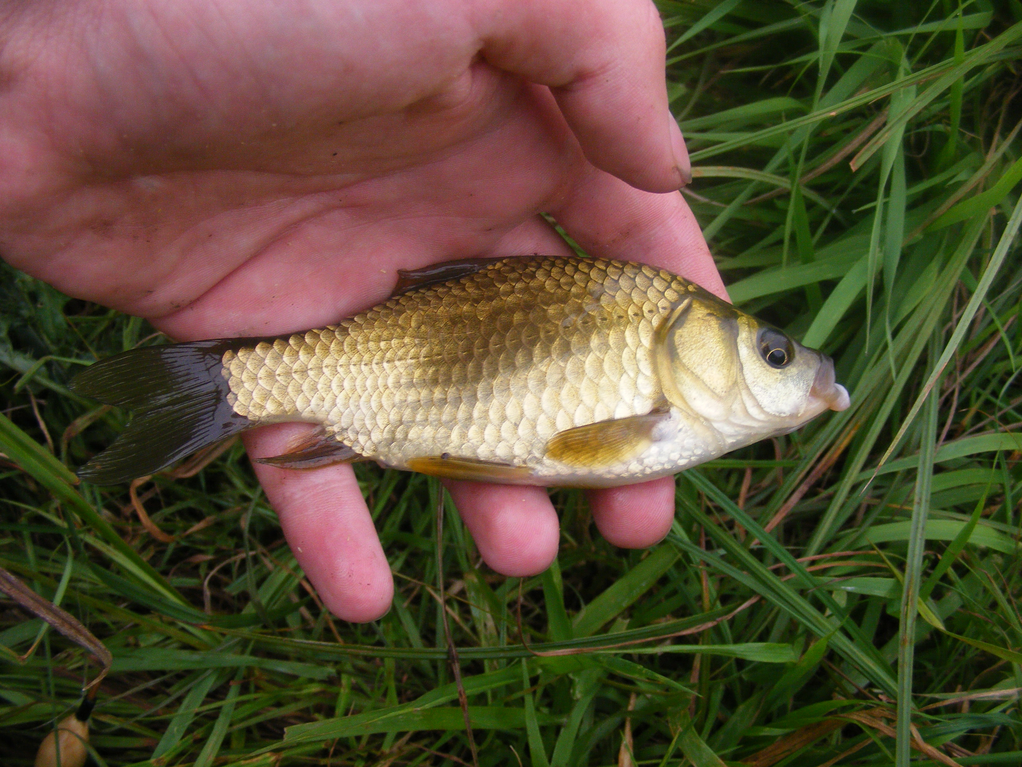 Carassius Carassius in a lake, near Csíkszereda (Miercurea-Ciuc)